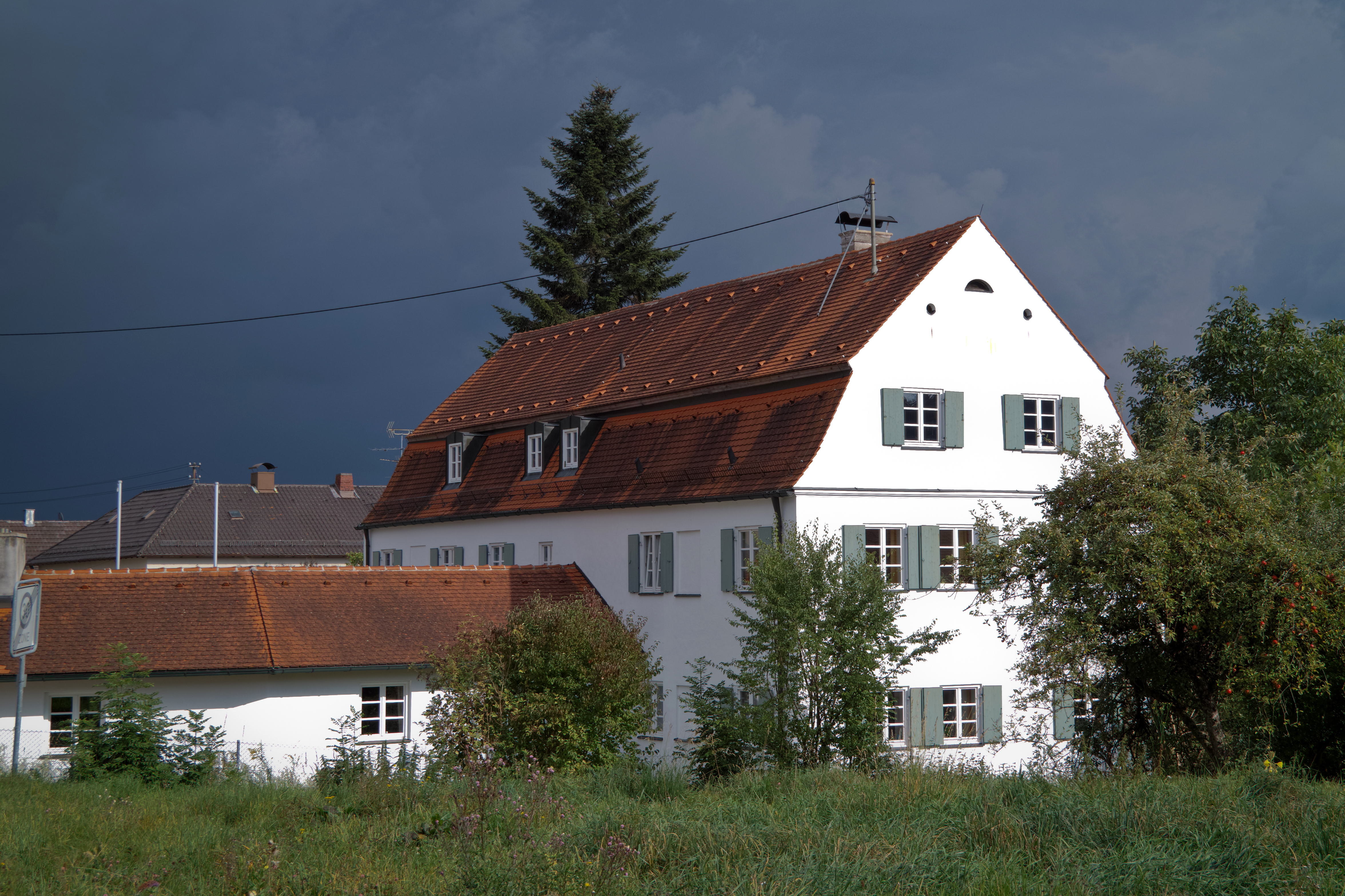 Ehem. Schlösschen, jetzt Forstverwaltung, zweigeschossiger Mansarddachbau mit Giebelgesims, 2. Hälfte 18. Jh.; Nebengebäude, erdgeschossiger Walmdachbau, wohl 18. Jh.This is a photograph of an architectural monument.